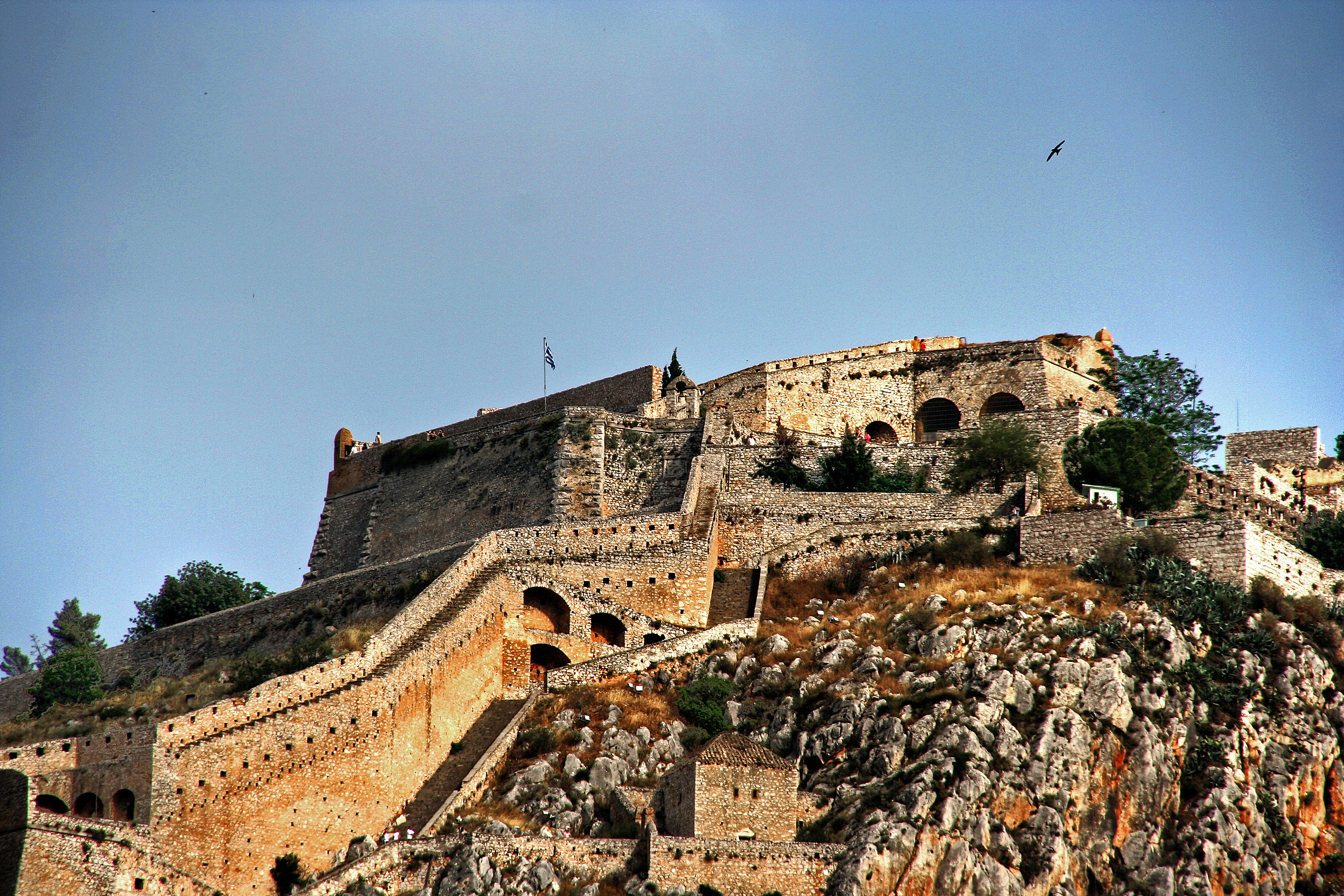 Palamidi